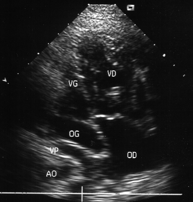 Coupe 4 cavités - Chenal cave dérivant le sang provenant des veines pulmonaires vers l'oreillette droite.